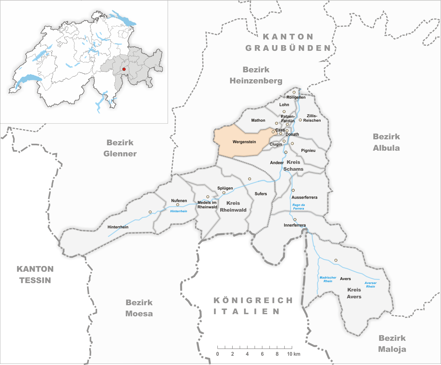 Municipality Wergenstein Artist: Tschubby